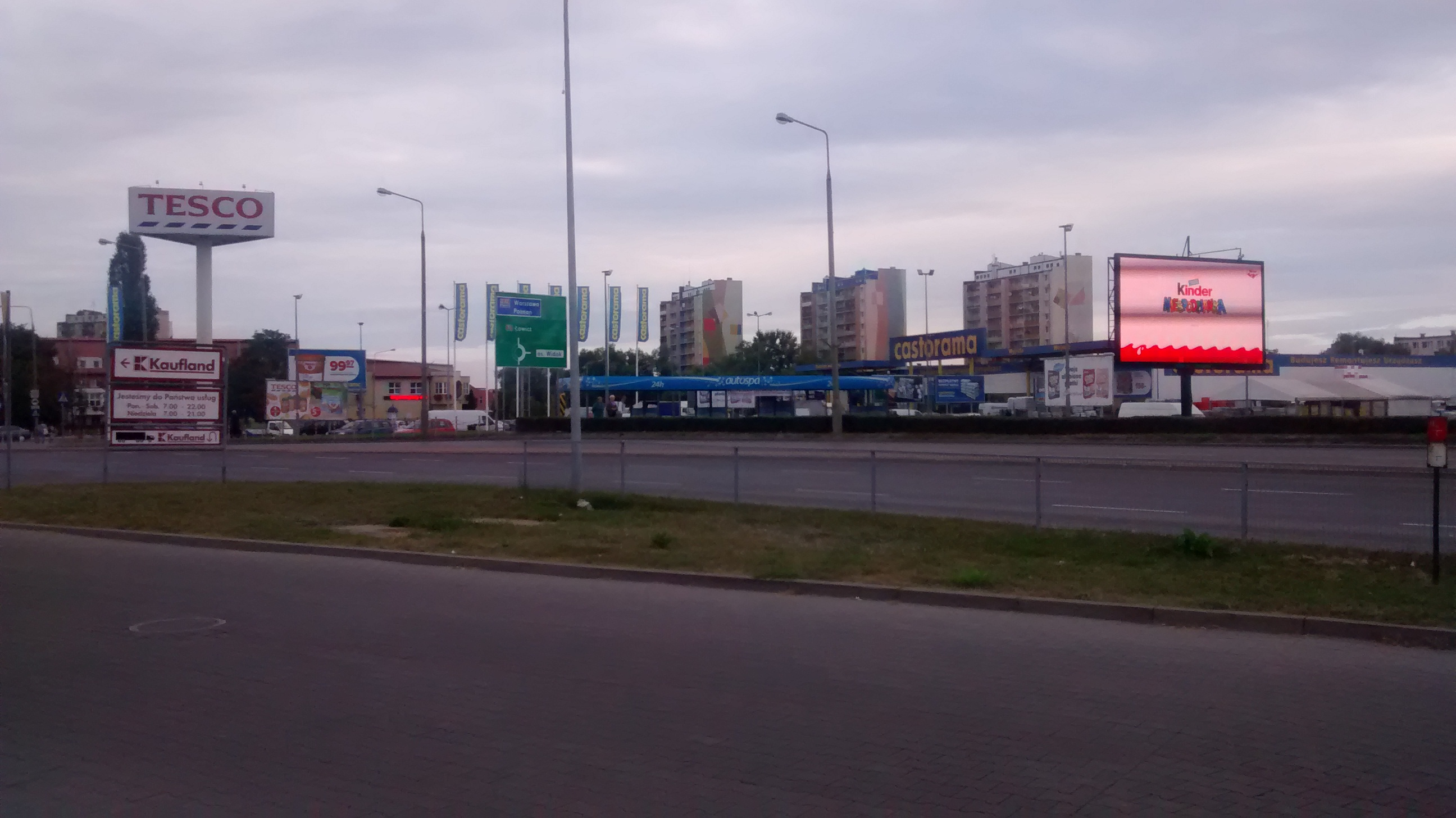 Tesco Castorama, Kaufland w dzielnicy Widok